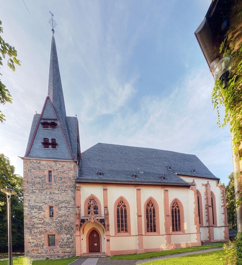 Evangelische Marienkirche in Ortenberg im Wetteraukreis